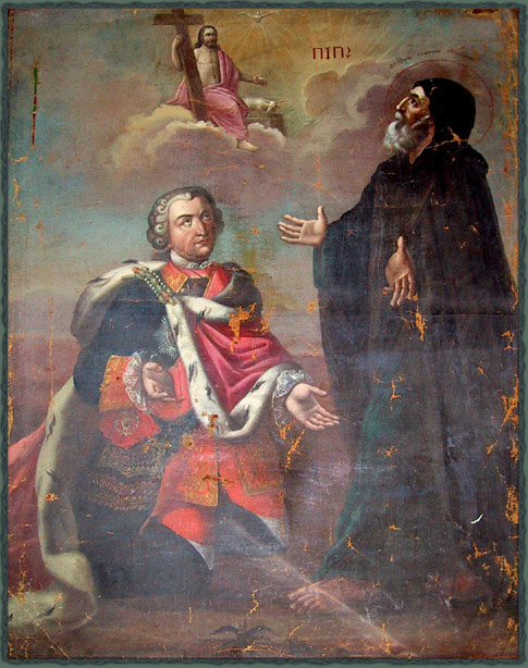 Портрет работы неизвестного художника хранится в Тульском музее изобразительных искусств (Россия)